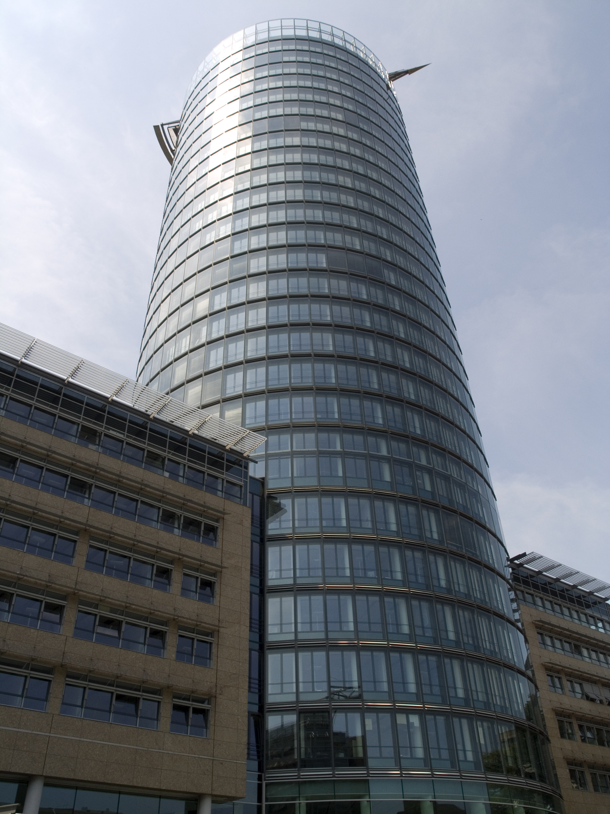 Северный Рейн - Вестфалия, Дюссельдорф. Высотное здание Victoria-Turm